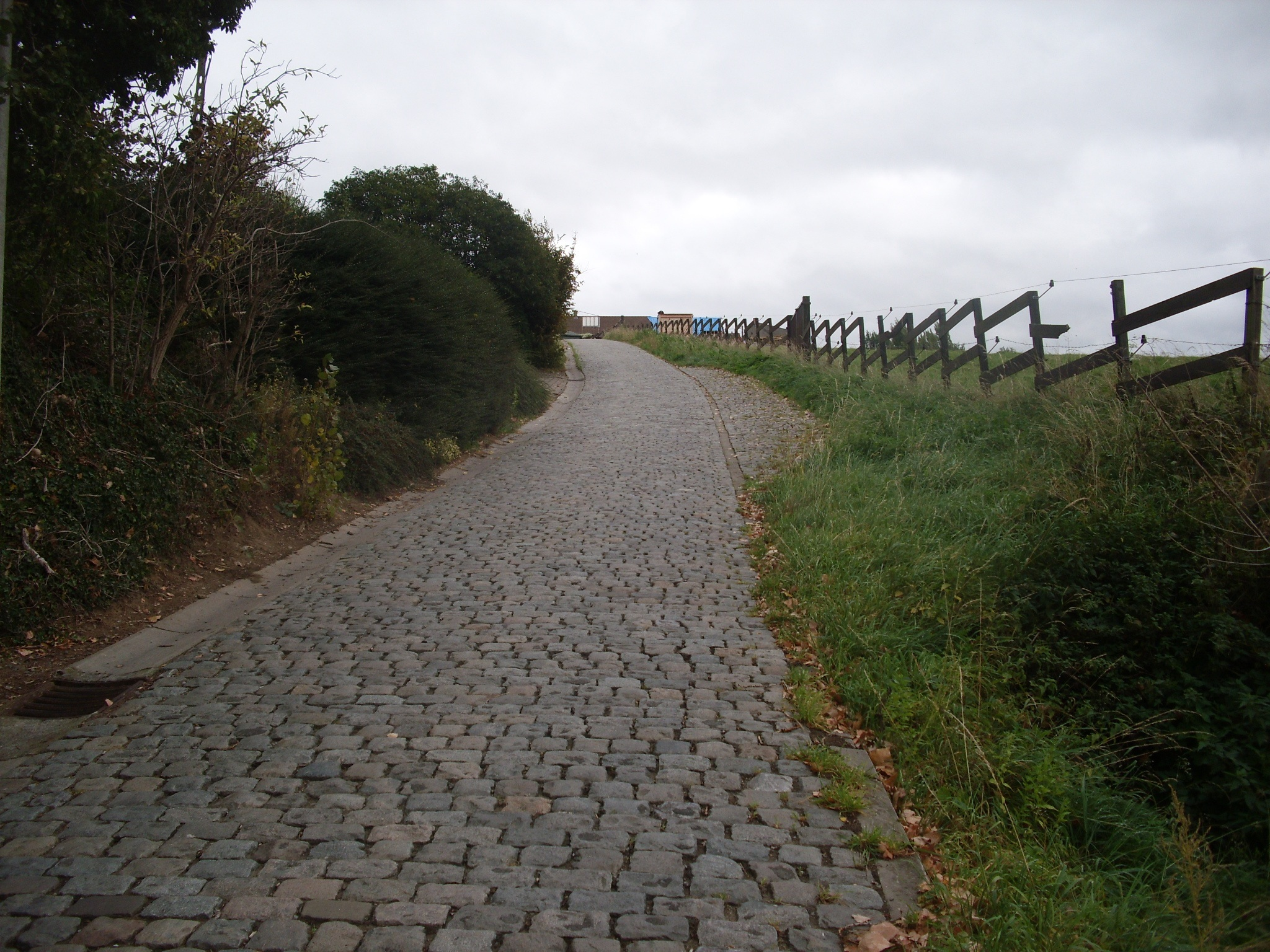 Paterberg in Kluisbergen - Oost-Vlaanderen - België